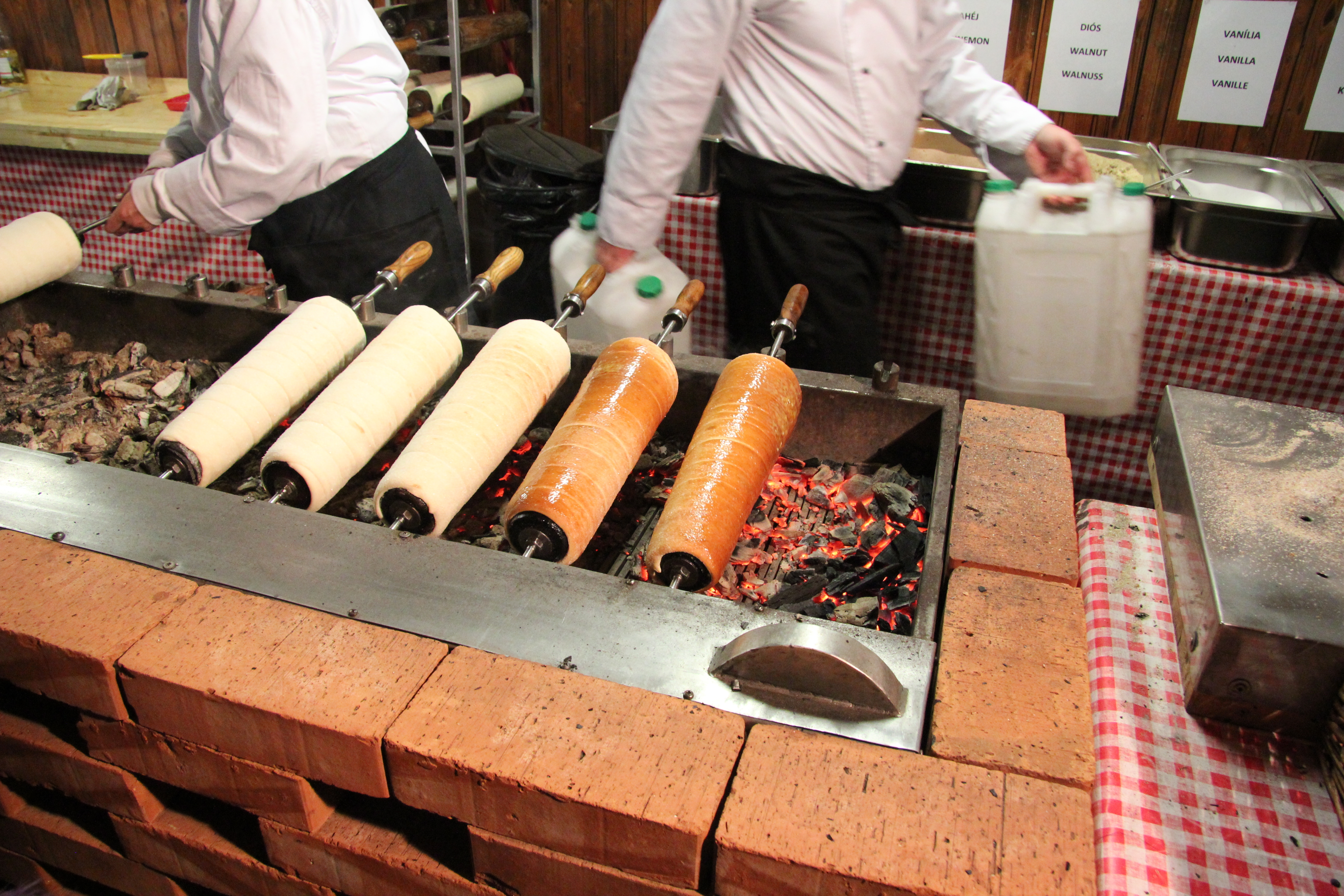 Baumkuchen auf einem Budapester Weihnachtsmarkt